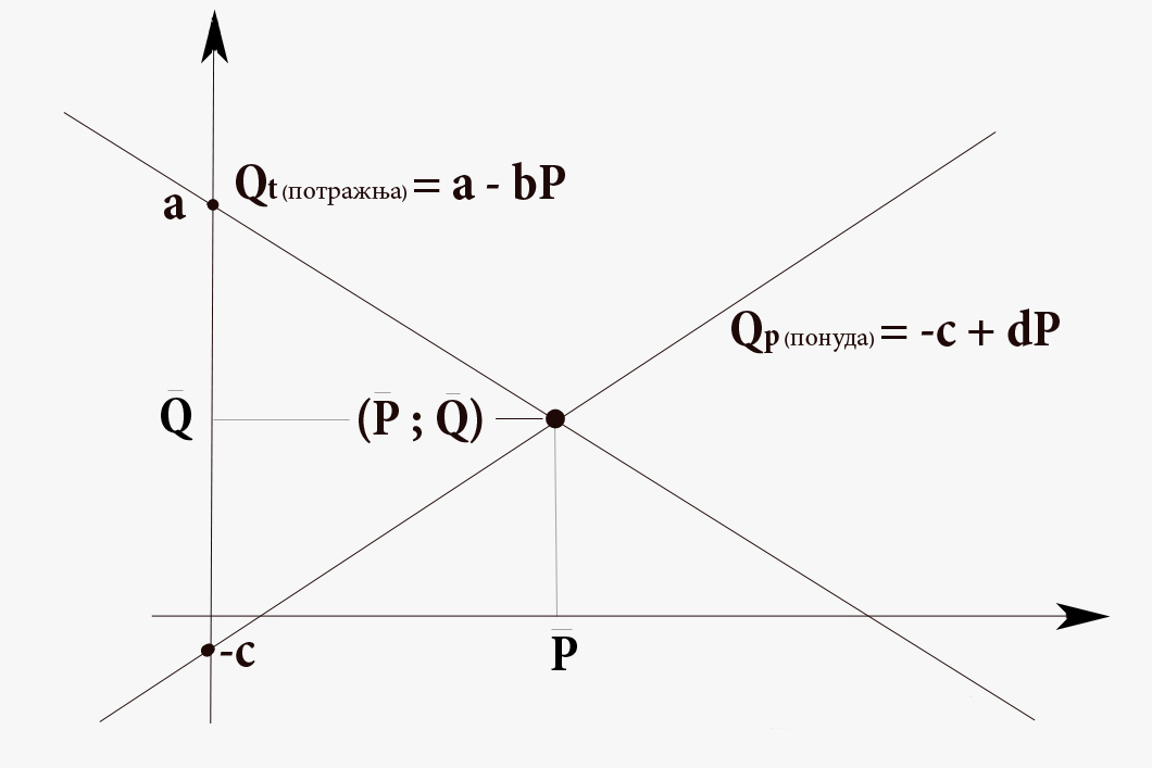 Линеарни модел парцијалног тржишта за илустрацију чланка о математичкој економији Licensing